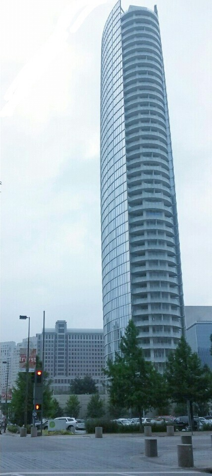 Fotografía del edificio "Museum Tower" ubicado en el centro de Dallas